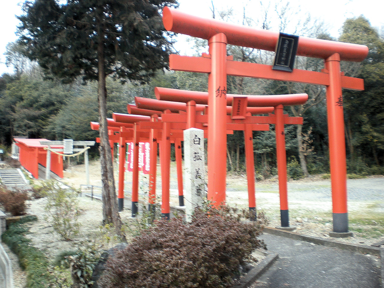 愛知県春日井市の松原神社内にある境内社・白孤義兼神社